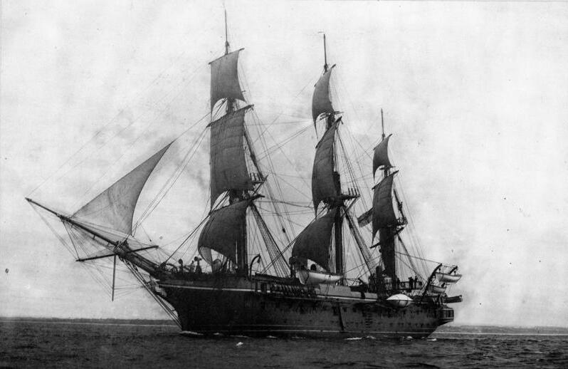 S.M.S. Nixe unter Segel